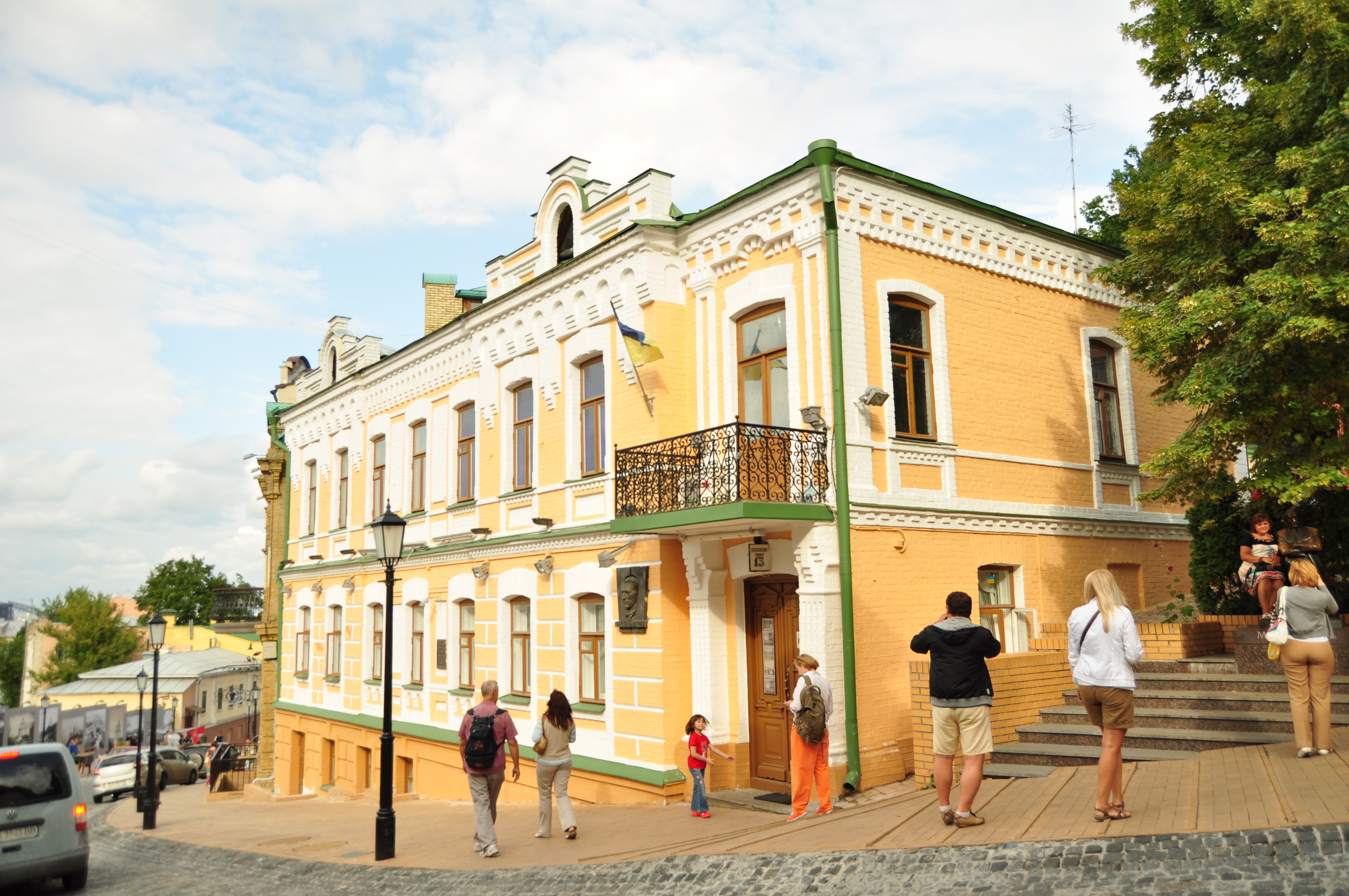 Будинок житловий, в якому у 1906—1922 рр. мешкали М. О. Булгаков, радянський письменник; родина Булгакових; у 1906 р. О. А. Кошиць, композитор, хоровий диригент; В. П. Листовничий, цивільний інженер, архітектор, Київ, Андріївський узвіз, 13